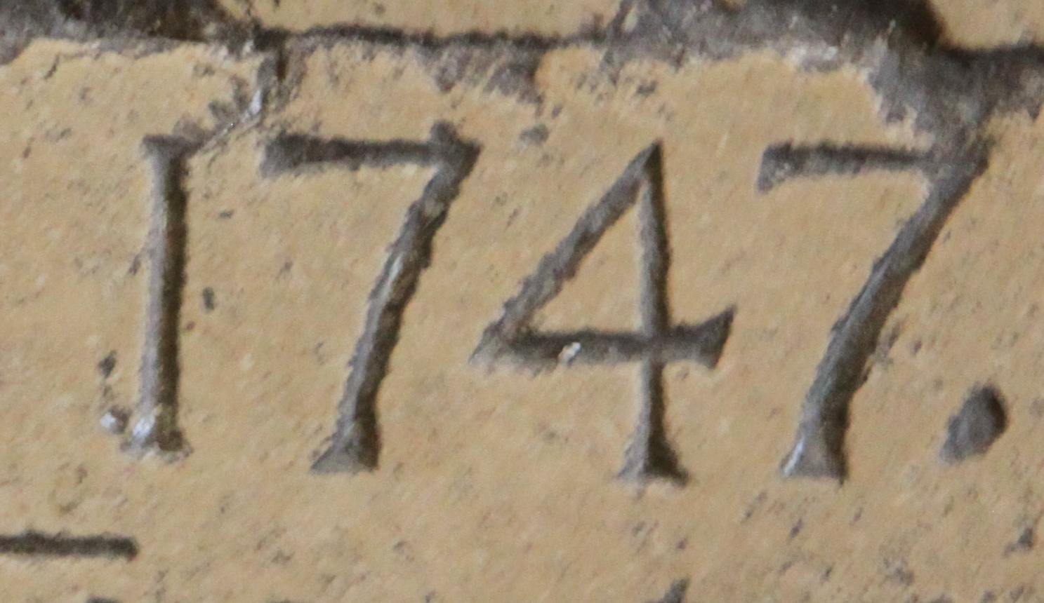 Fragment d'una làpida del monestir de Sant Pere de Besalú amb la inscripció de l'any 1747